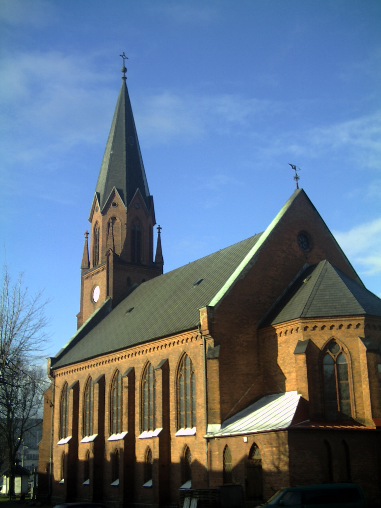 Ustka, ul. Marynarki Polskiej 79a - dawny kościół ewangelicki, ob. rzymskokatolicki kościół parafialny pw. Najświętszego Zbawiciela, 1885